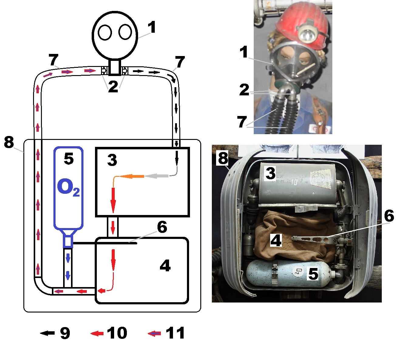 Автономный дыхательный аппарат с закрытым контуром (схема). (1) маска, (2) обратный клапан, (3) химический поглотитель углекислого газа, (4) дыхательный мешок, (5) баллон с кислородом, (6) рычаг, реагирующий на степень наполнения дыхательного мешка - для подачи кислорода из баллона, (7) шланги для вдыхаемого и выдыхаемого воздуха, (8) корпус СИЗОД, (9) выдыхаемый воздух, (10) горячий воздух, нагретый при удалении углекислого газа за счёт экзотермической реакции, (11) нагретый воздух, пригодный для дыхания, содержащий кислород в необходимом количестве.